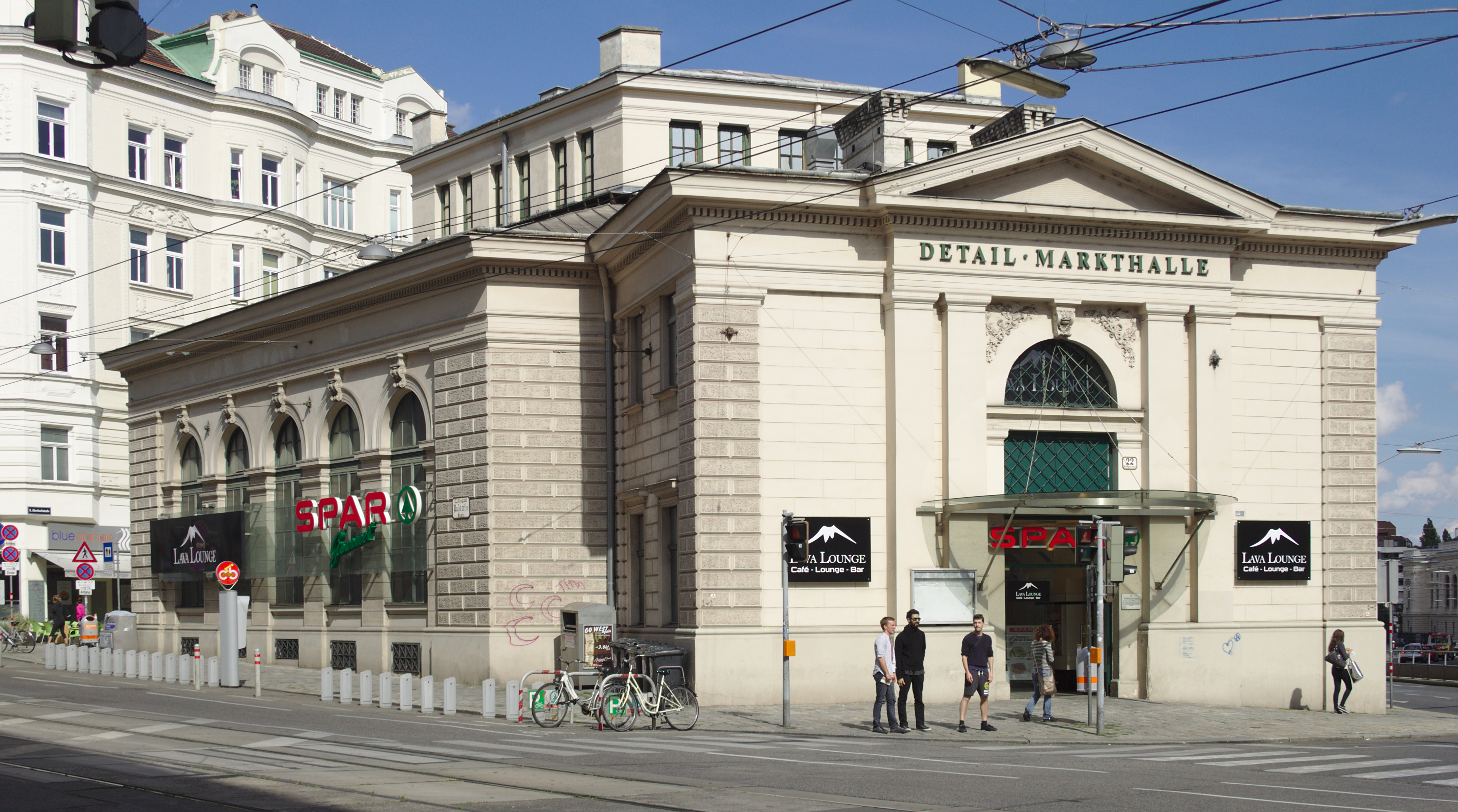 Markthalle Nußdorf